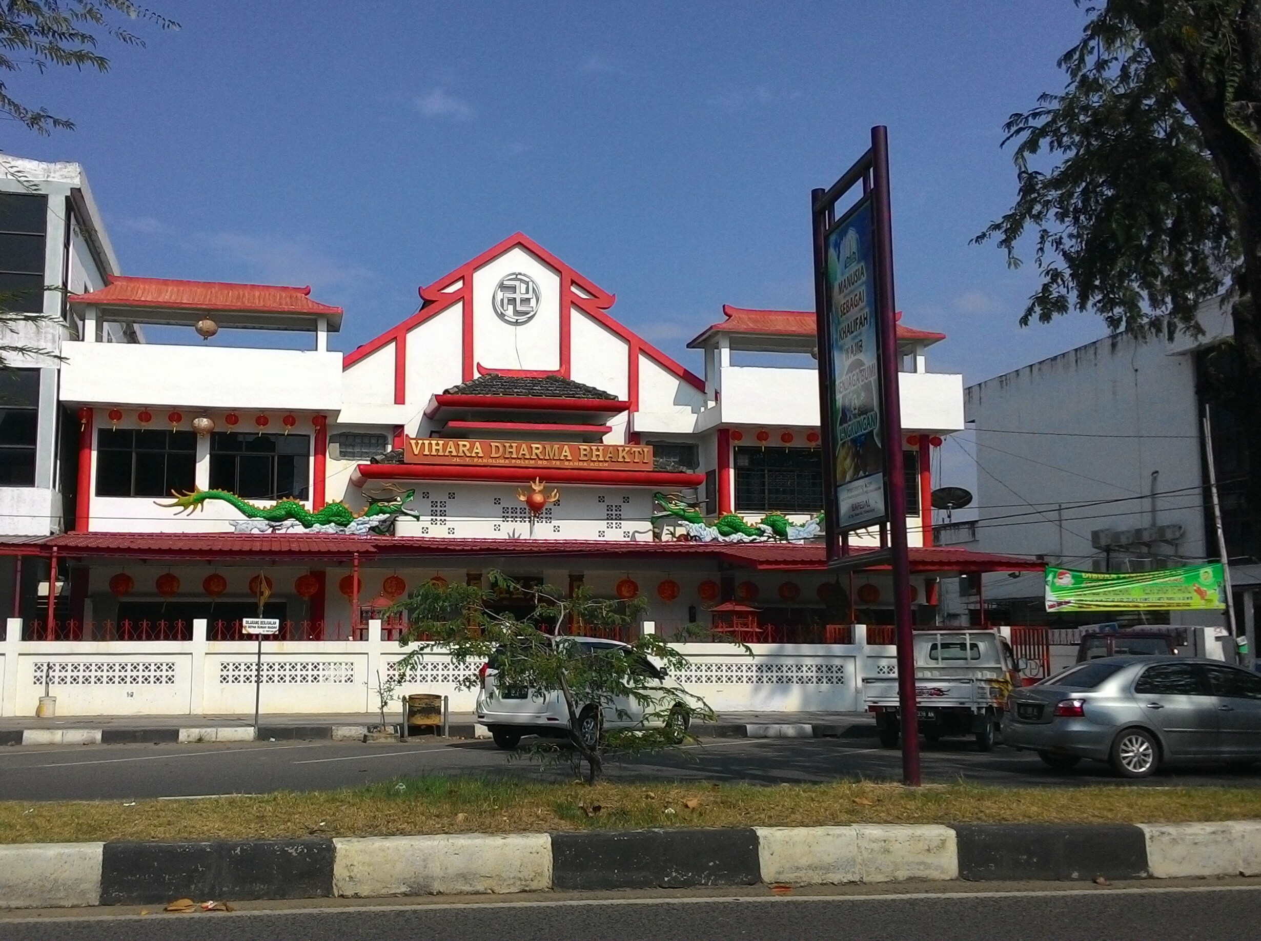 Vihara Dharma Bhakti di Banda Aceh, Aceh, Indonesia